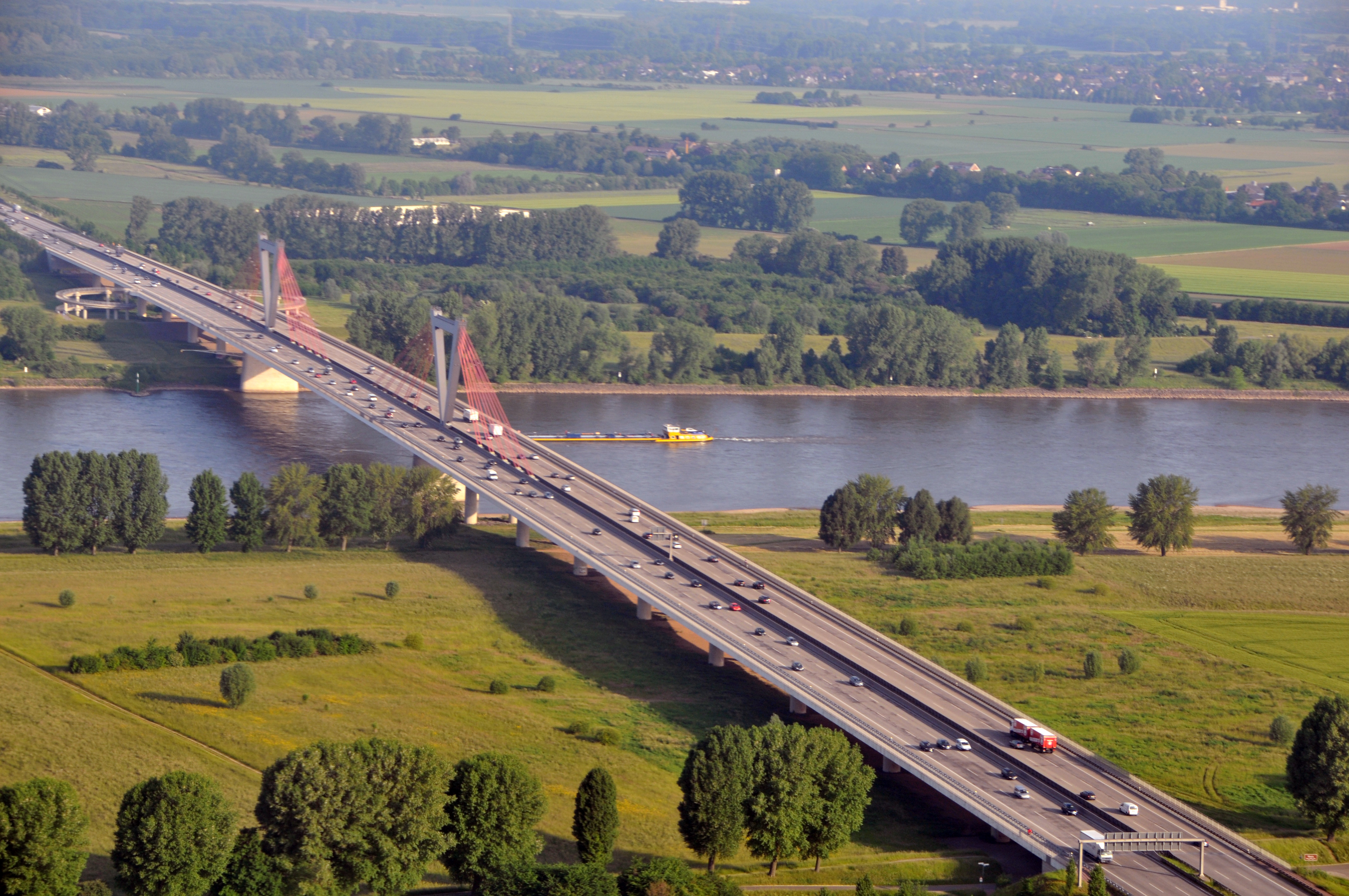 Pont sur le Rhin a proximite de Düsseldorf en Allemagne